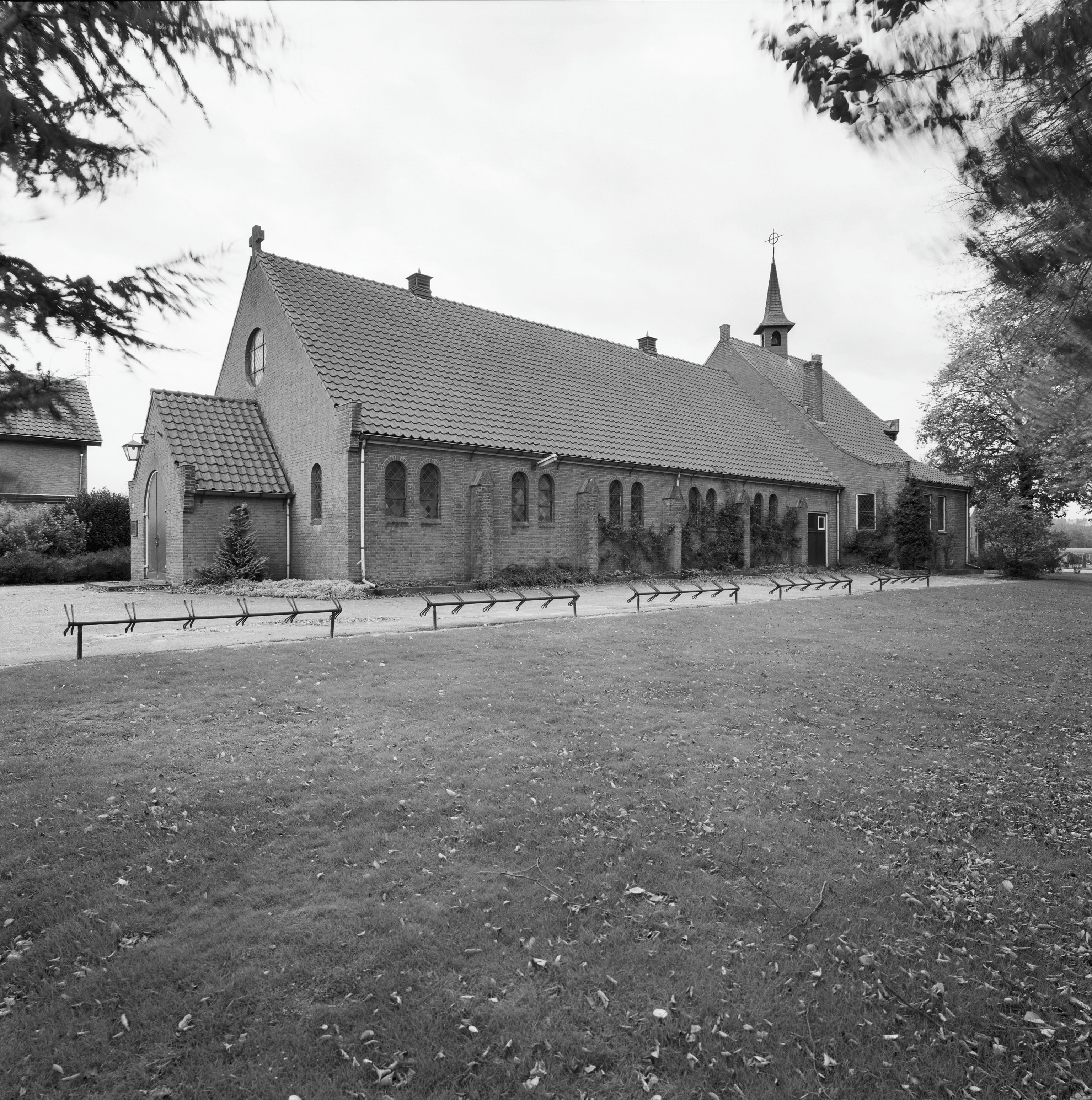 ROOMS-KATHOLIEKE KERK (SACRAMENTSKERK): Exterieur OVERZICHT ZUIDGEVEL